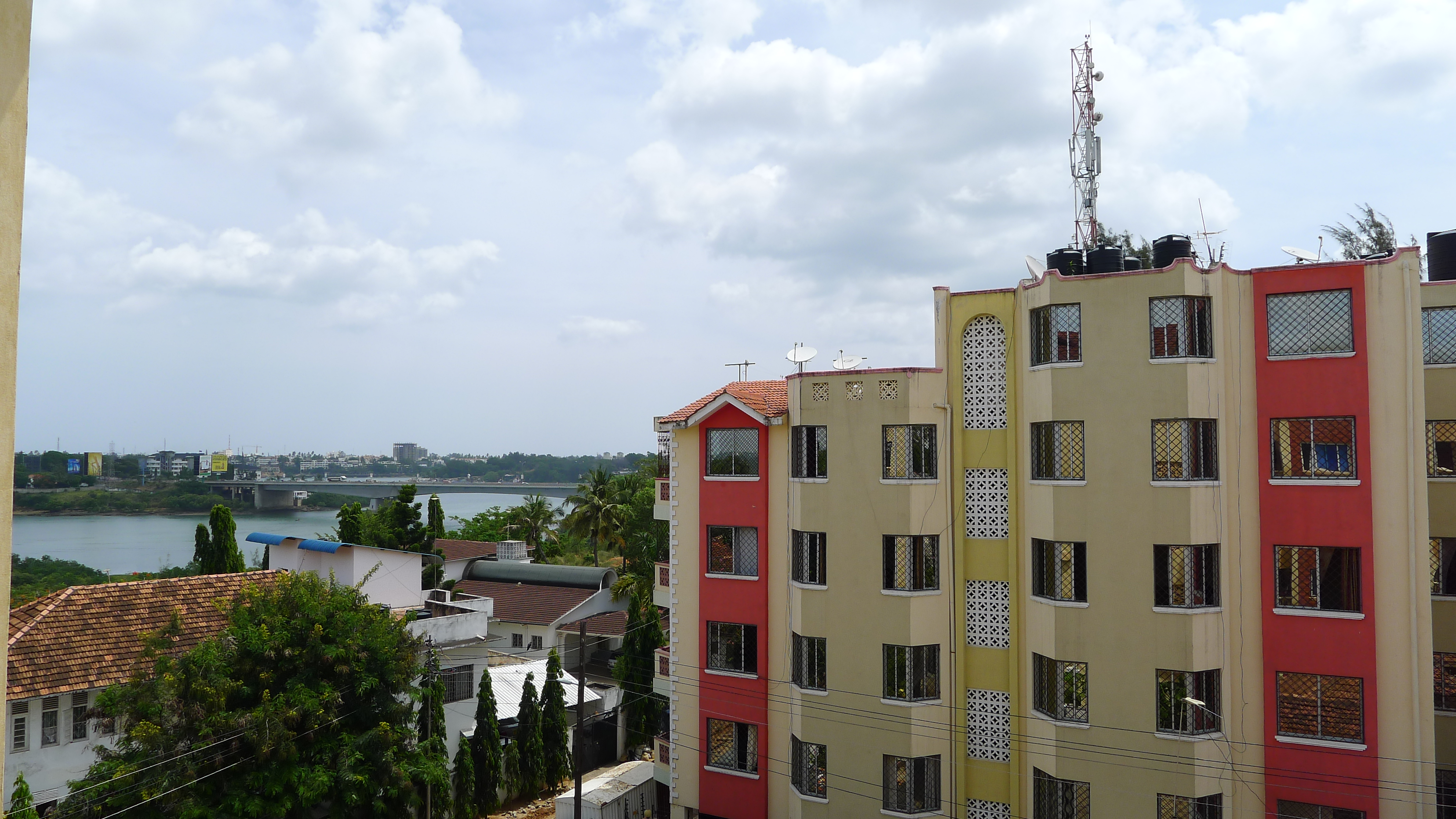 Tudor, Mombasa